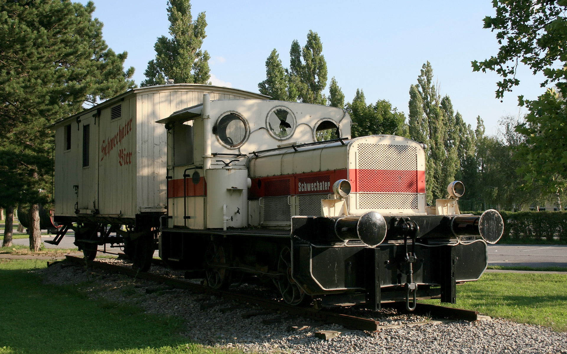 Historischer Eisenbahnzug am Vorplatz des Brauereimuseums der Brauerei Schwechat (Schwechat, Niederösterreich)